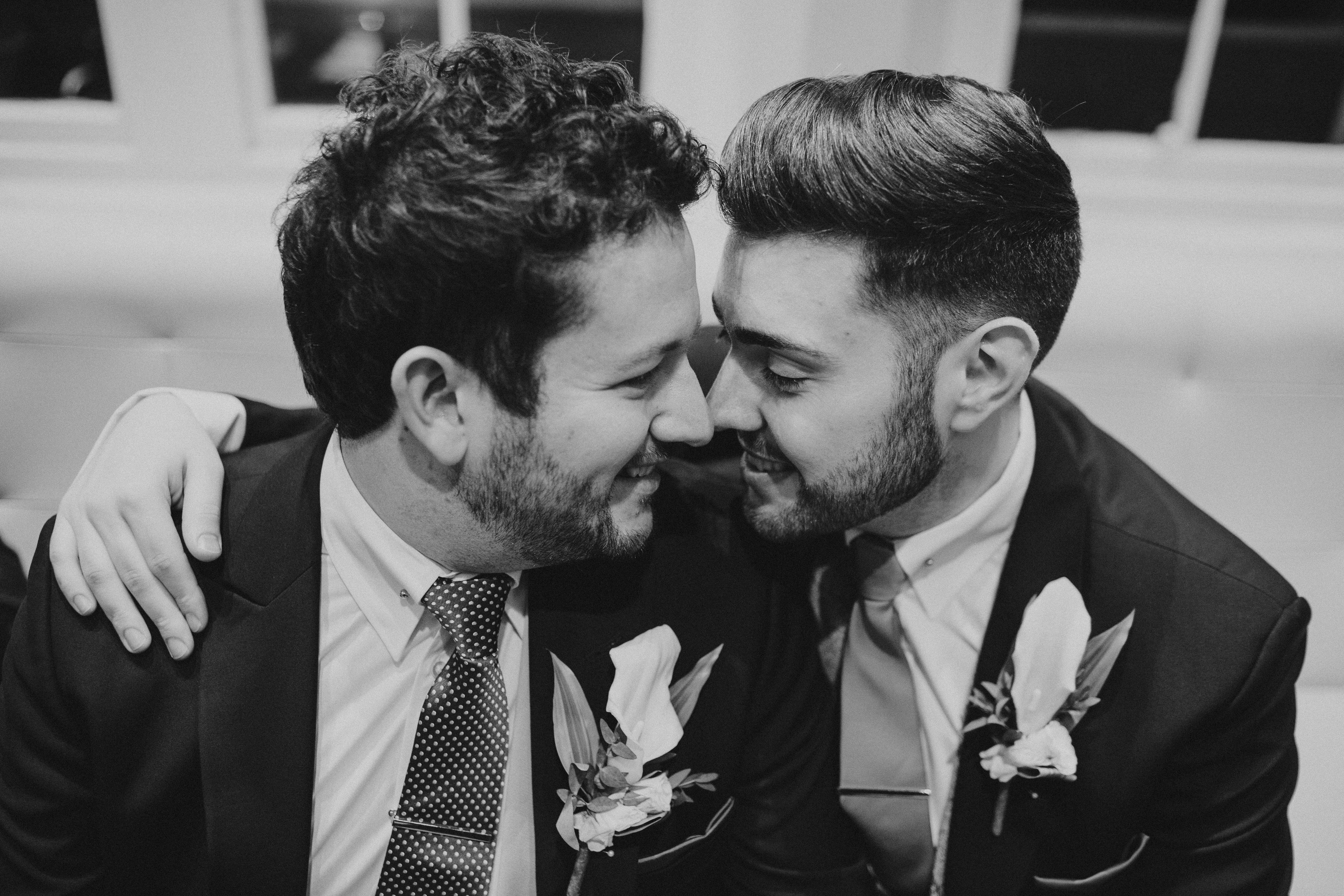 Matrimonio del 21 febbraio 2015 nel Regno Unito.